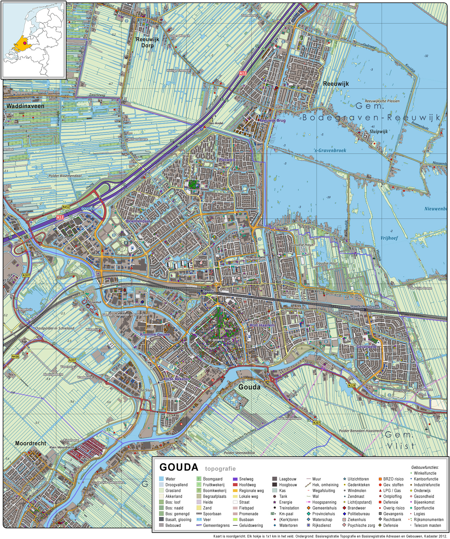 Topografisch beeld van de stad Gouda. Op basis van de GML open geodata van de BRT/Top10NL (basisregistratie Topografie, Kadaster 2012), vrijgegeven door Kadaster op 30-11-2012 onder de Creative Commons BY licentie. Gebouwvlakken vanuit Open Geodata BAG extract (december 2012). Samenstelling en kleurenschema: Jan-Willem van Aalst, met QuantumGIS en Photoshop.